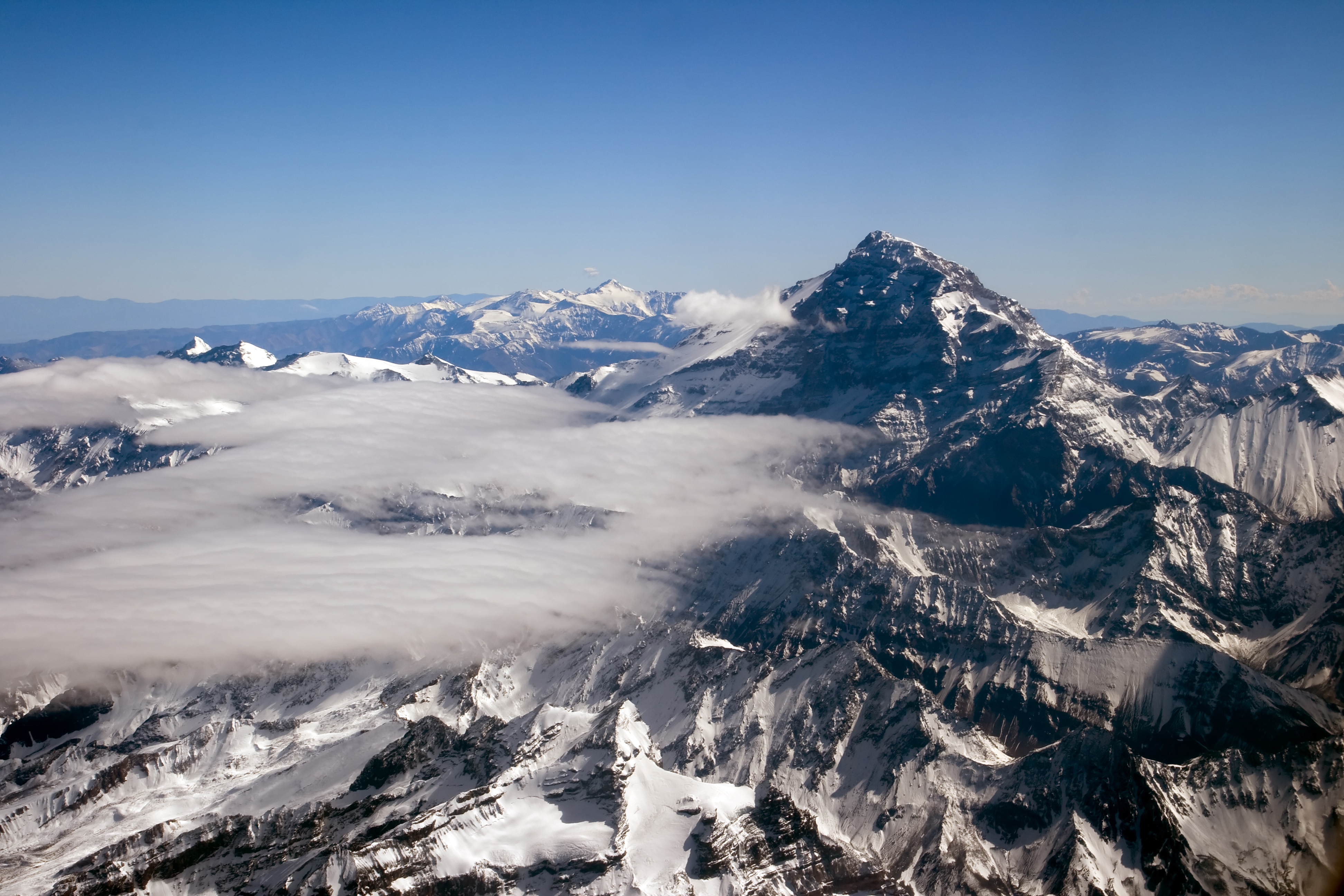 Aconcagua